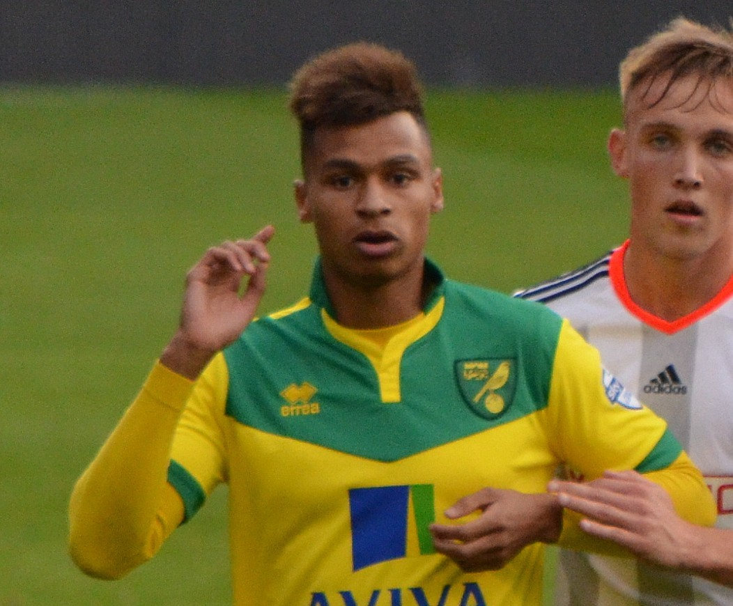 Fulham v Norwich (2014)